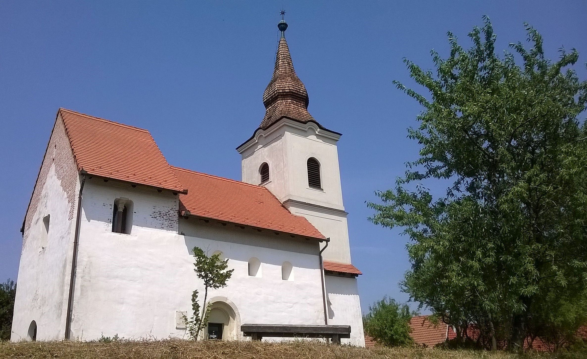 A zánkai református műemléktemplom